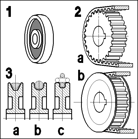 Riemenantriebe (2007) Flachriemenscheibe a: Zahnriemenscheibe ohne Bordscheiben, b: Zahnriemenscheibe mit Bordscheiben Querschnitte durch a: Keilriemenscheibe, b: Rundriemenscheibe, c: Kettenriemenscheibe